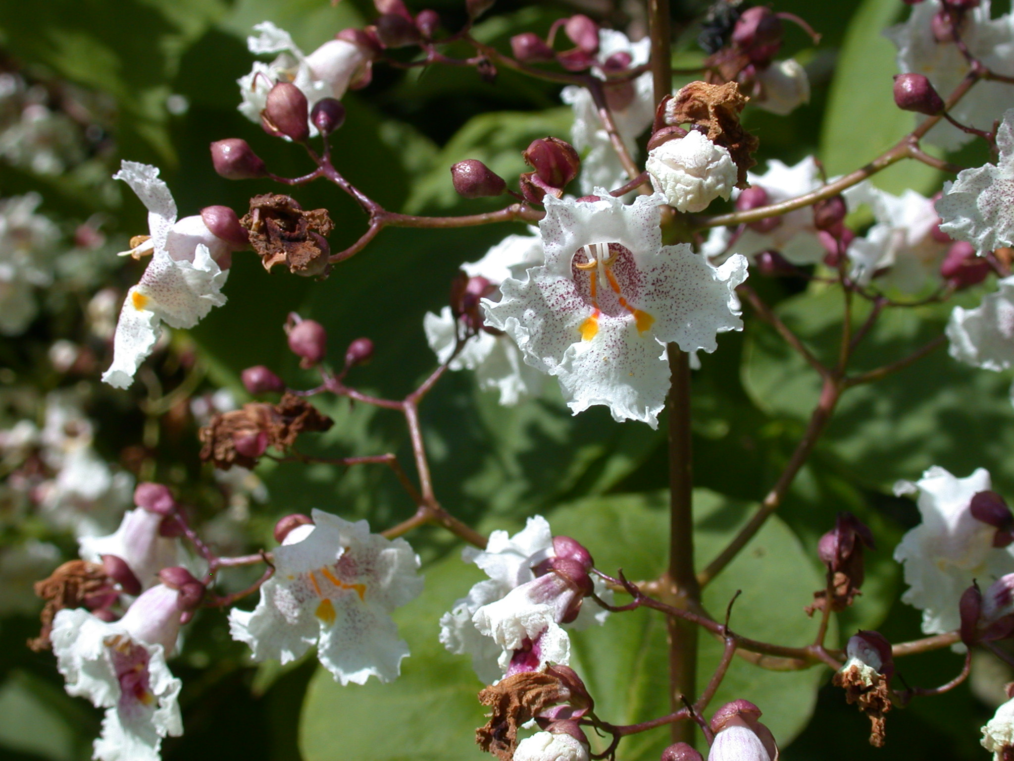 Specimen labelled: "Catalpa x erubescens 'Purpurea'. Bignoniaceae. Garden Origin."